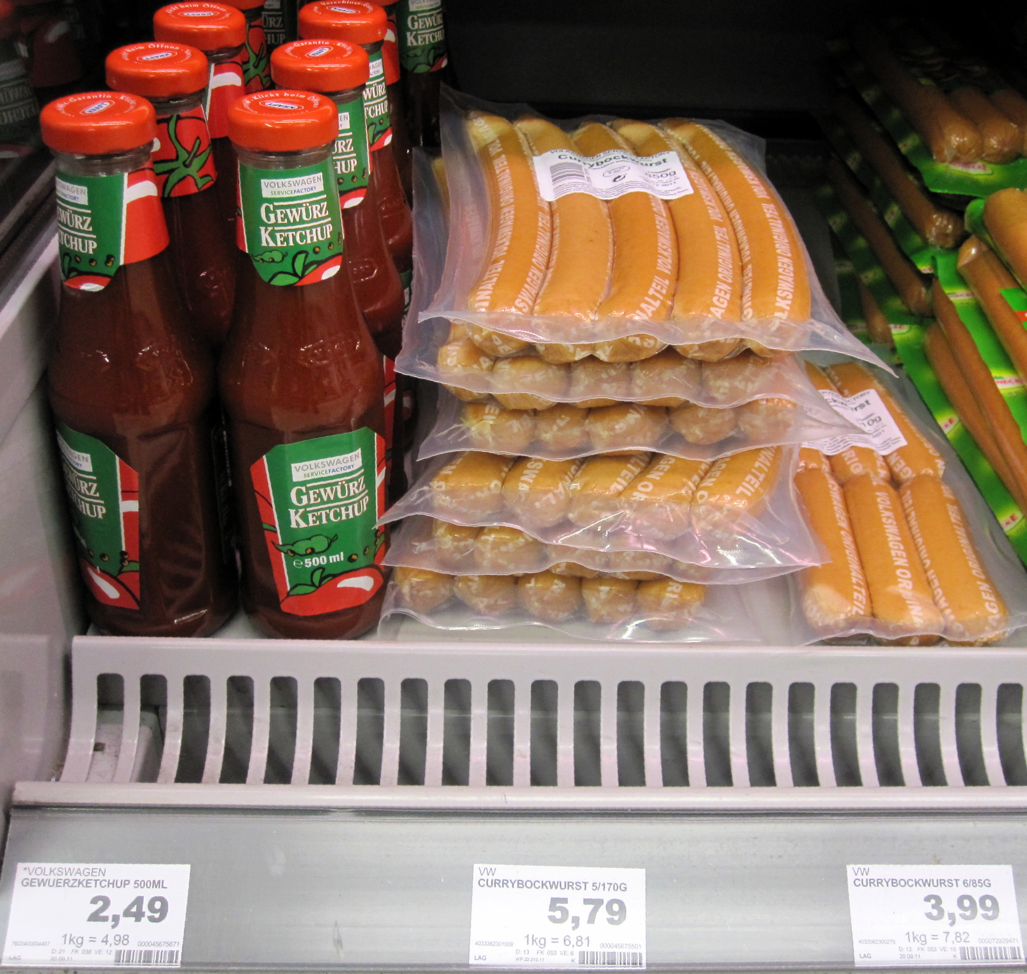 In Flaschen abgefülltes VW-Gewürzketchup (à 500 ml) sowie in Fertigpackungen eingeschweißte VW-Currywürste (à 170 g bzw. à 85 g) im Warenregal (mit daran angebrachten Preisschildern) eines Supermarktes in Braunschweig